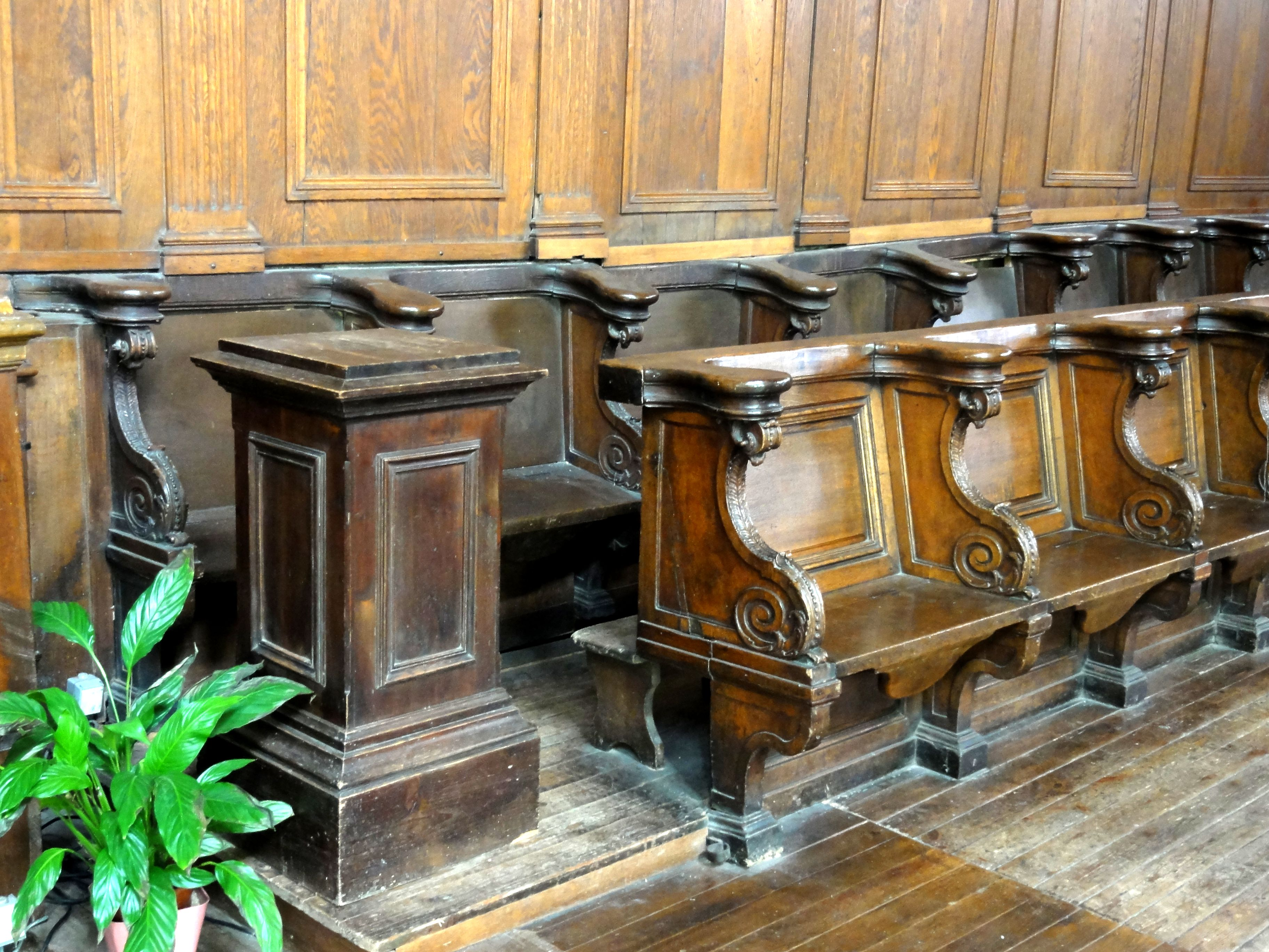 Stalles de l'abbaye de Maubuisson au chœur.